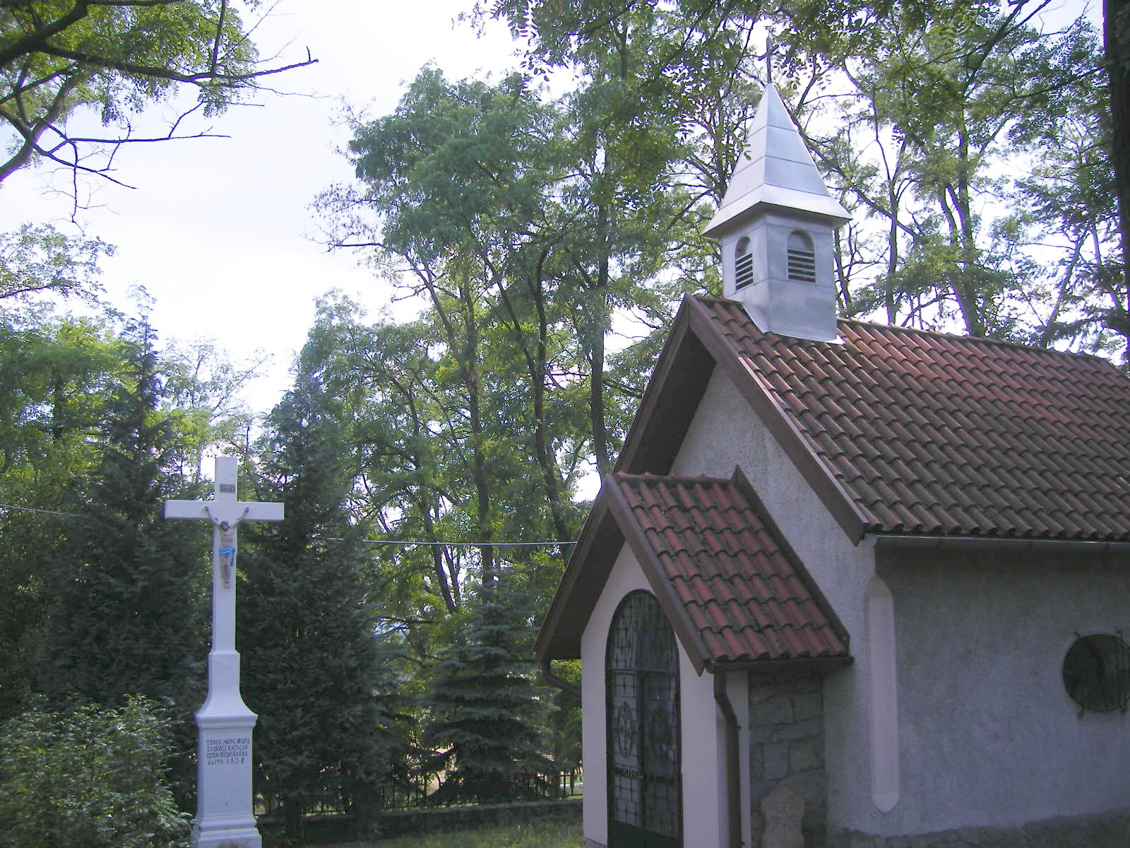 Ipolybalog - kápolna